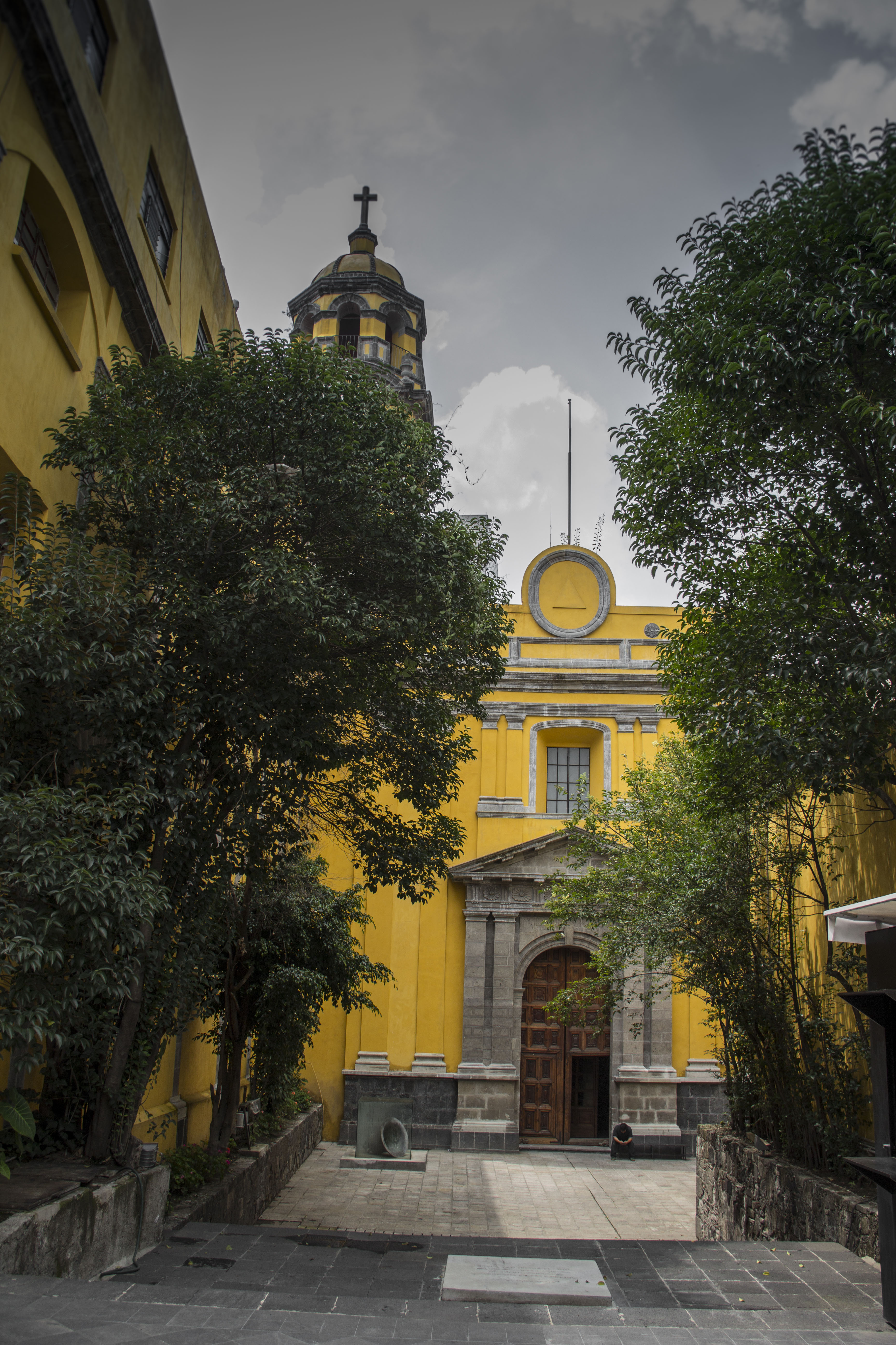 Templo de San Diego